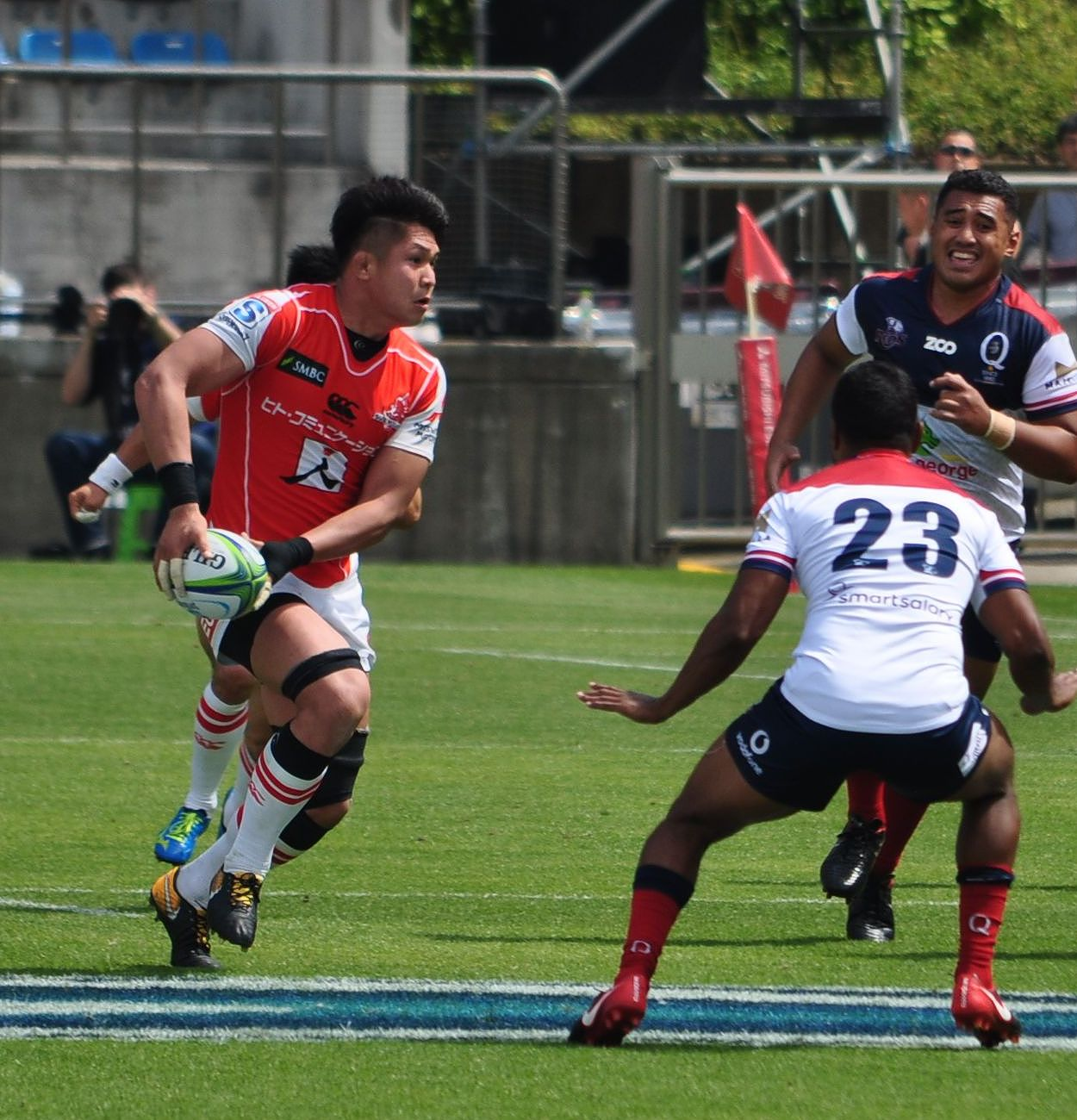 サンウルブズ vs レッズ戦